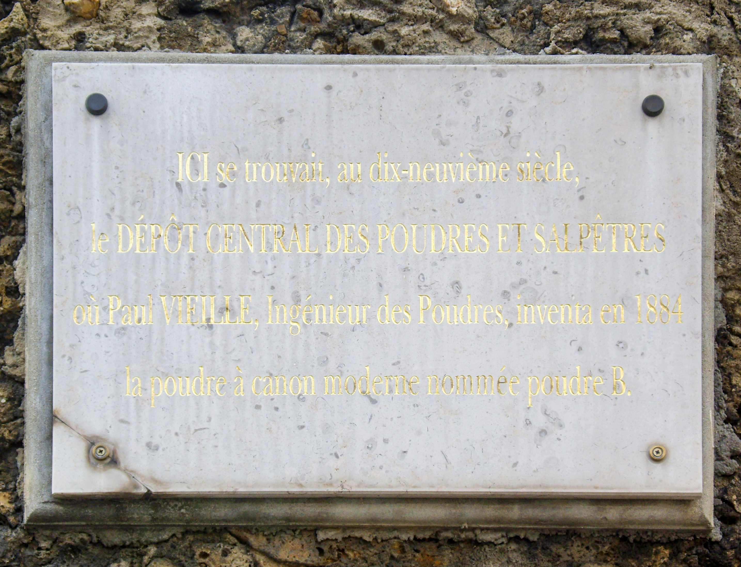 Plaque apposée au n° 9 de la rue de l'Arsenal, Paris 4e. « Ici se trouvait, au dix-neuvième siècle, le Dépôt central des poudres et salpêtres, où Paul Vieille, ingénieur des Poudres, inventa en 1884 la poudre à canon moderne nommée poudre B. »